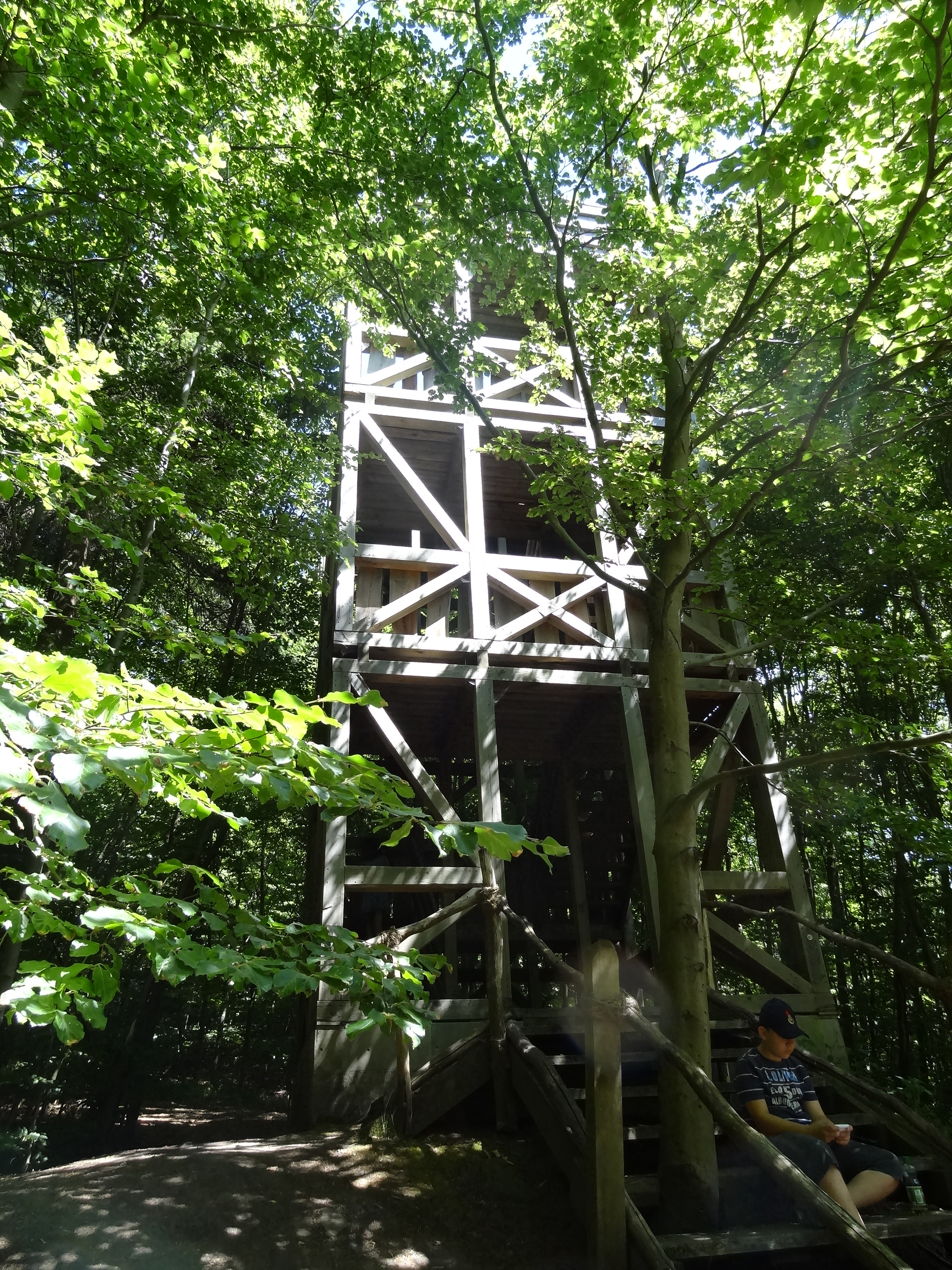 Grünes Meer